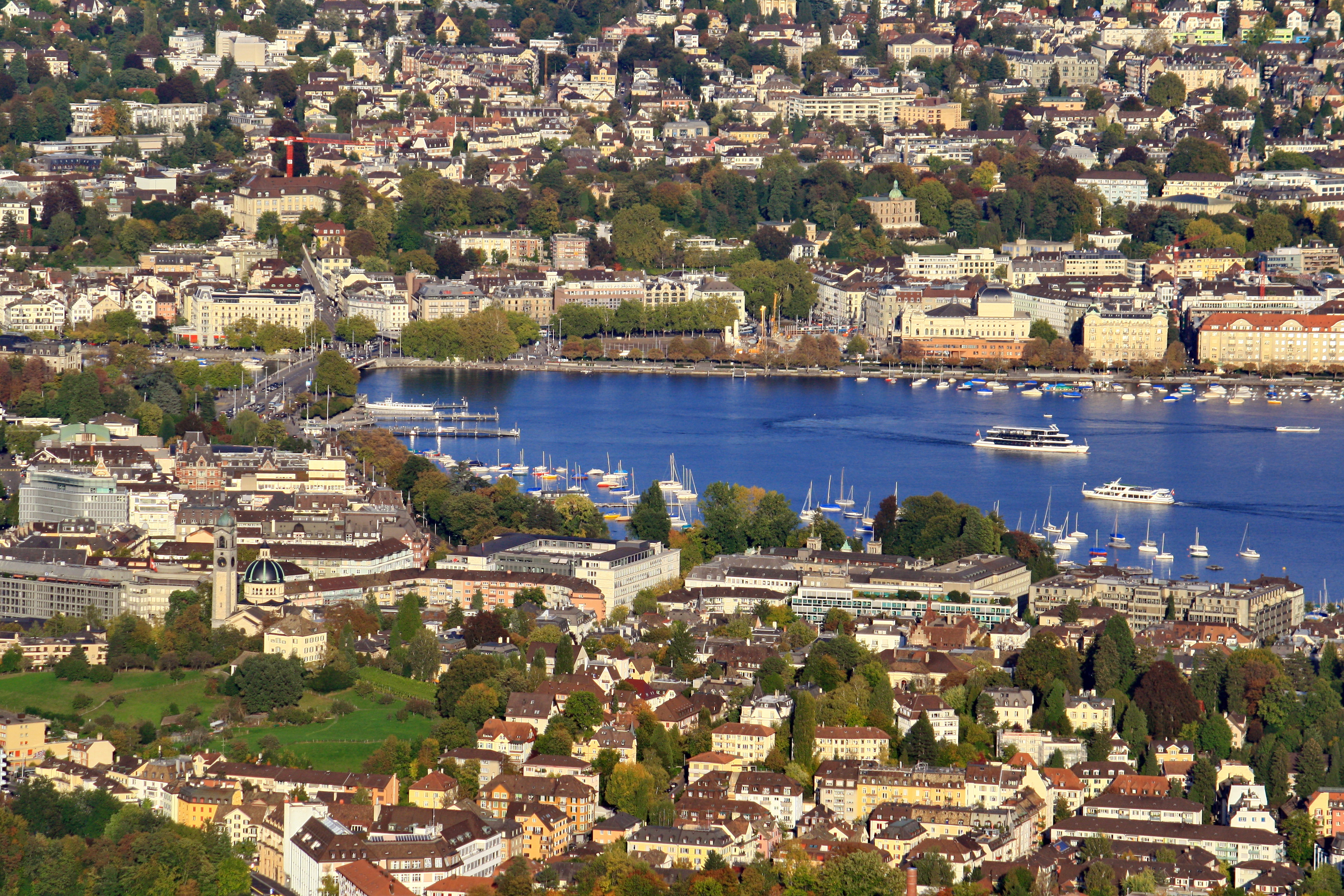 Zürich-Enge, Seefeld, Mühlebach and Hottingen quarters, as seen from Uetliberg Aussichtsturm